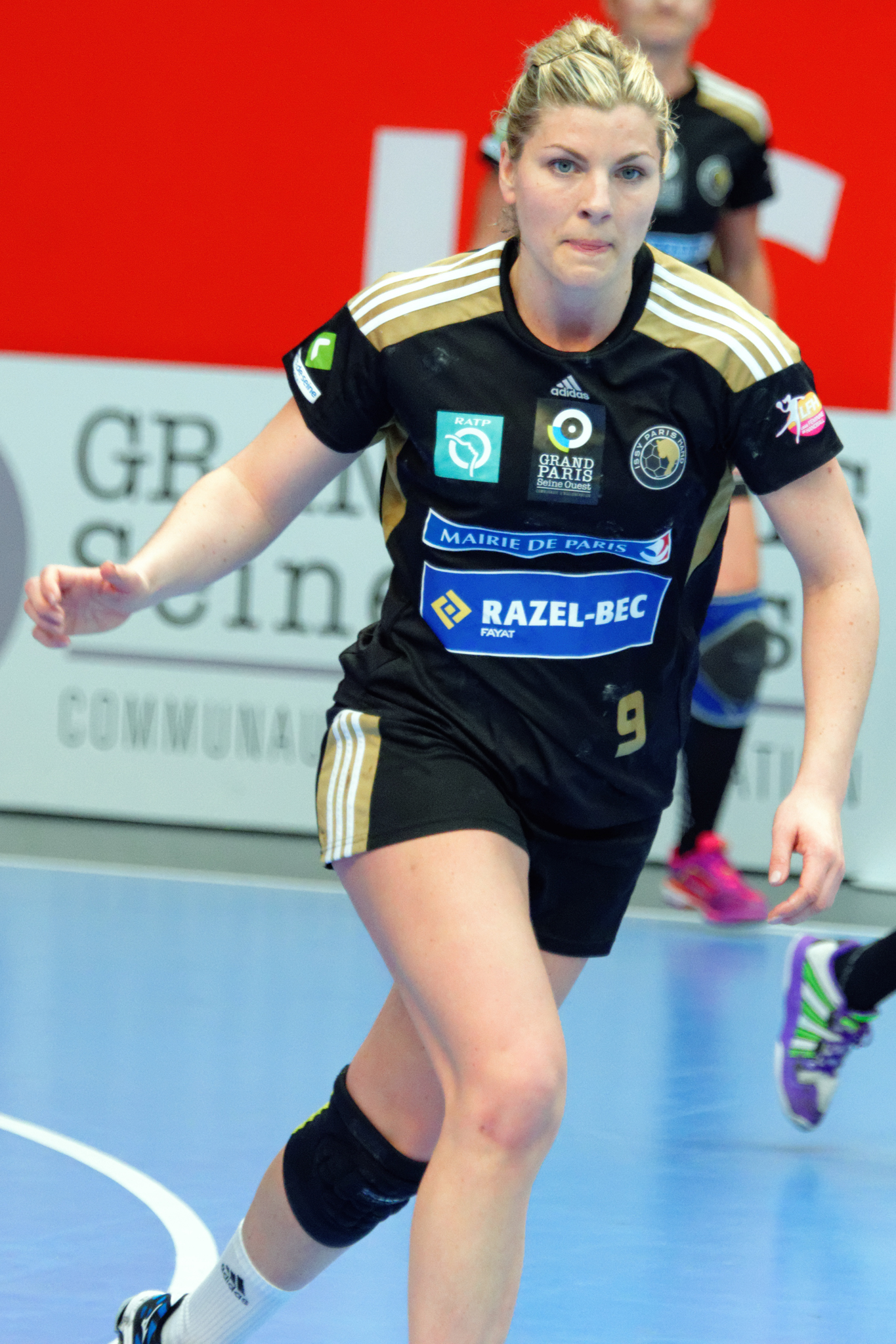 Frida Tegstedt, le 17 avril 2016 lors des playoffs contre Nantes LHB.